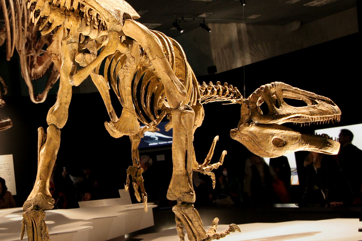 Megaraptor - 02